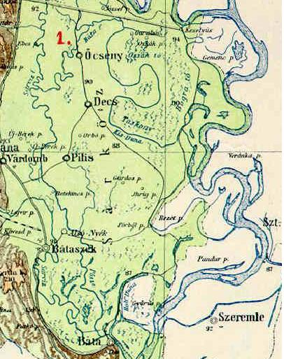 Sárköz (részlet Gönczy Pál Tolna vármegye térképéből)